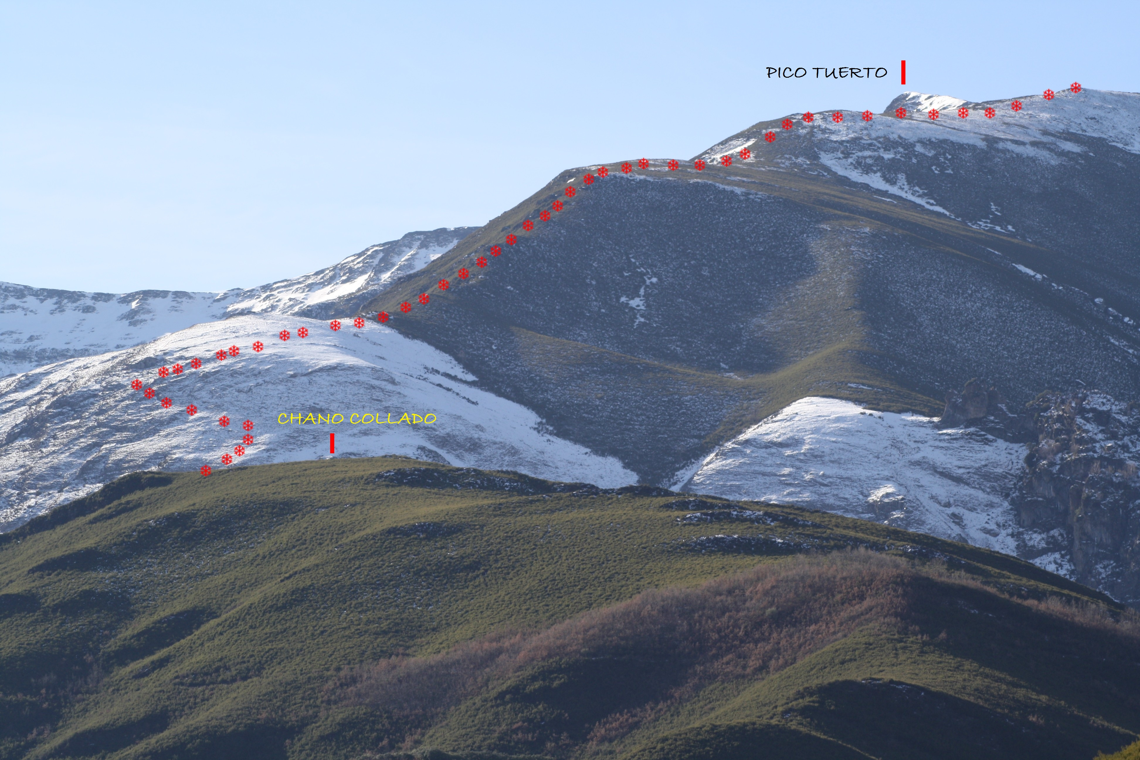 De chano collado a Pico tuerto